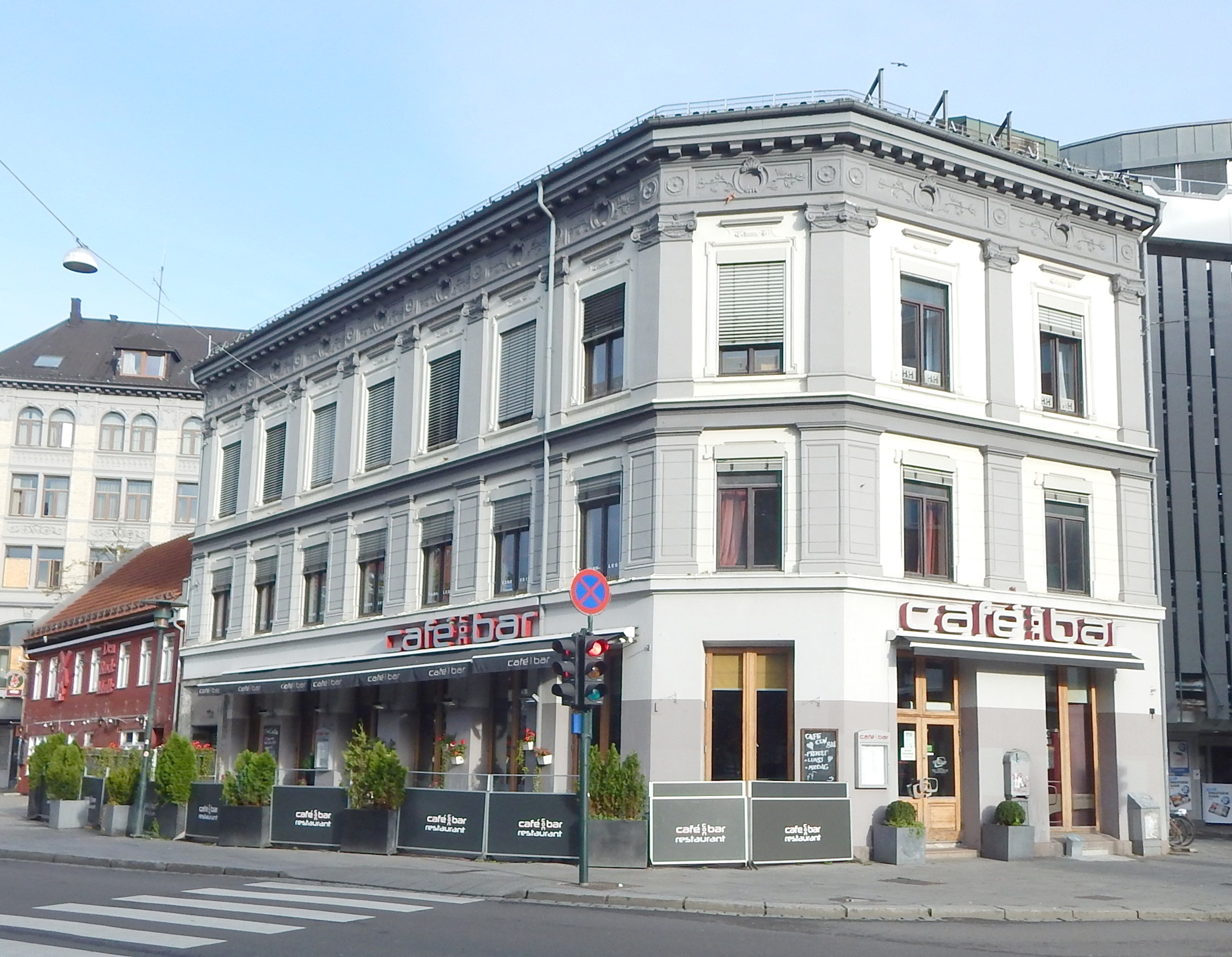 Brugata 11. Arkitekter: Ekman & Smith (byggemeldt 1889).